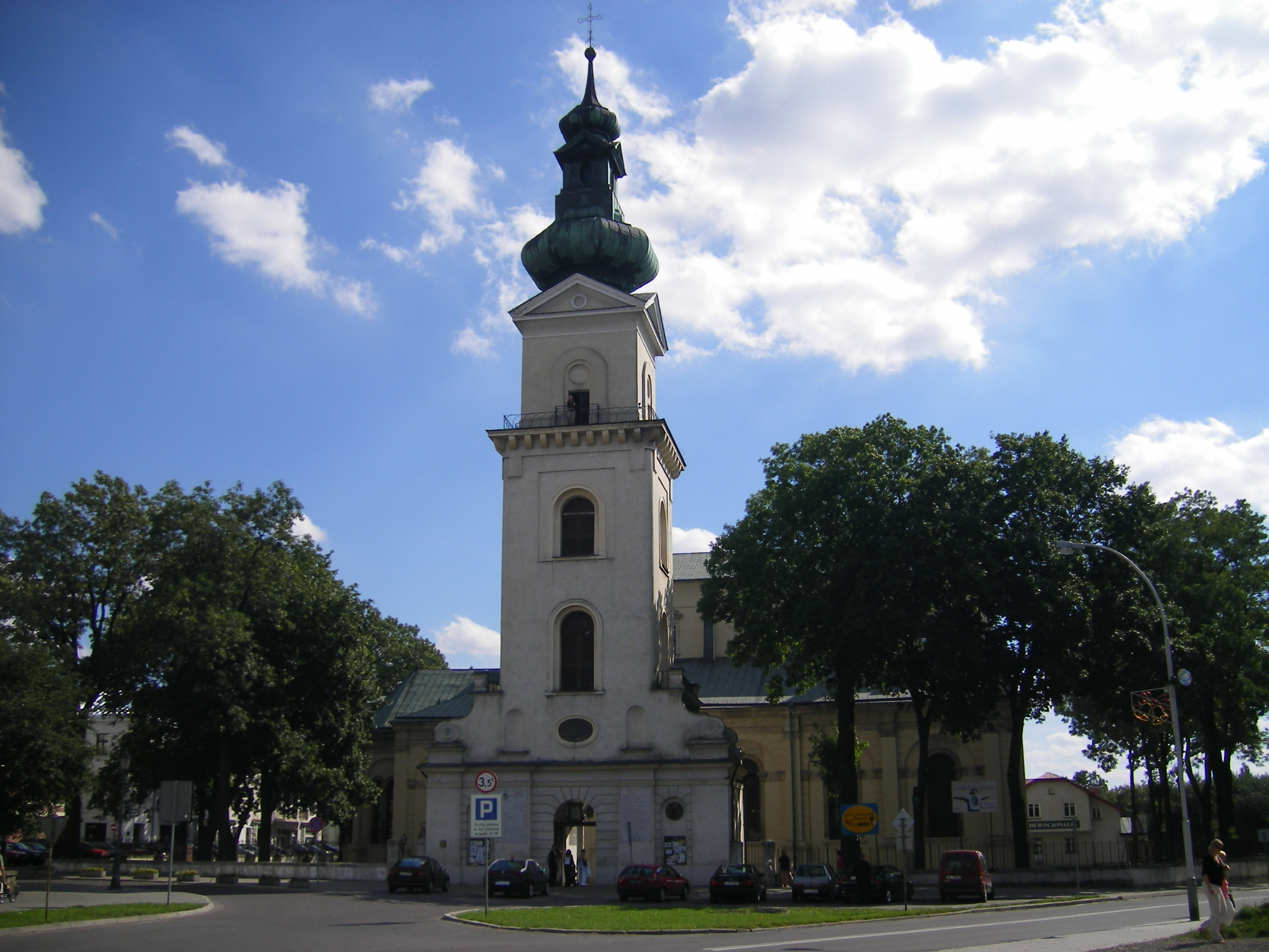 Zamość Cathedral Tower